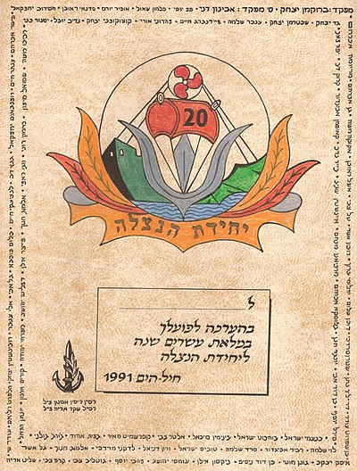 תעודת ההערכה במלאת 20 שנה ליחדת הנצלה ימית 1991